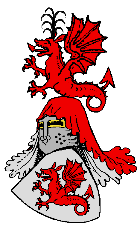 Wappen der Herren von Breidbach, rheinländischer ritterbürtiger Adel.